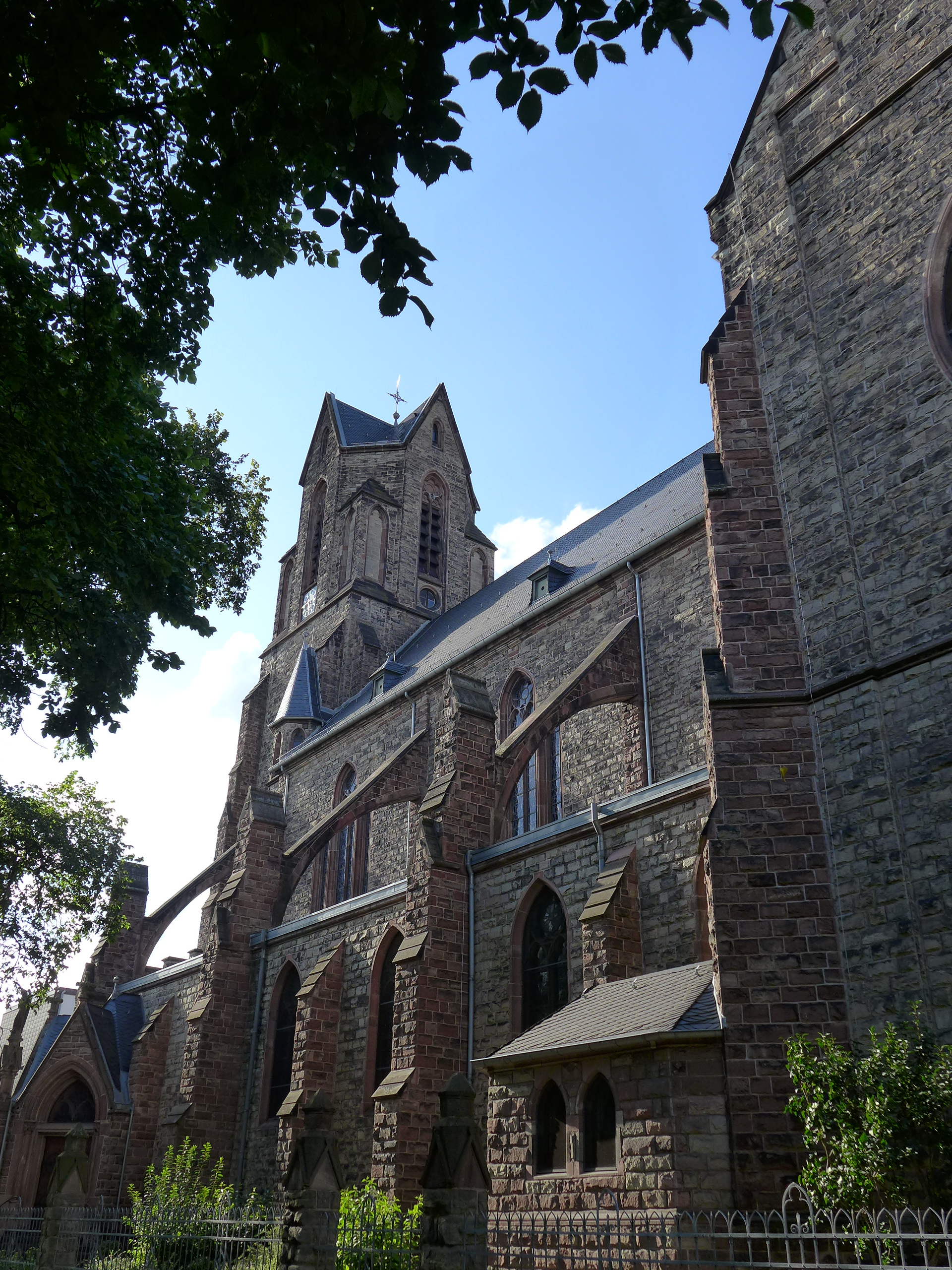 St. Josef (Saarbrücken), Seitenansicht vom unteren Malstatt aus